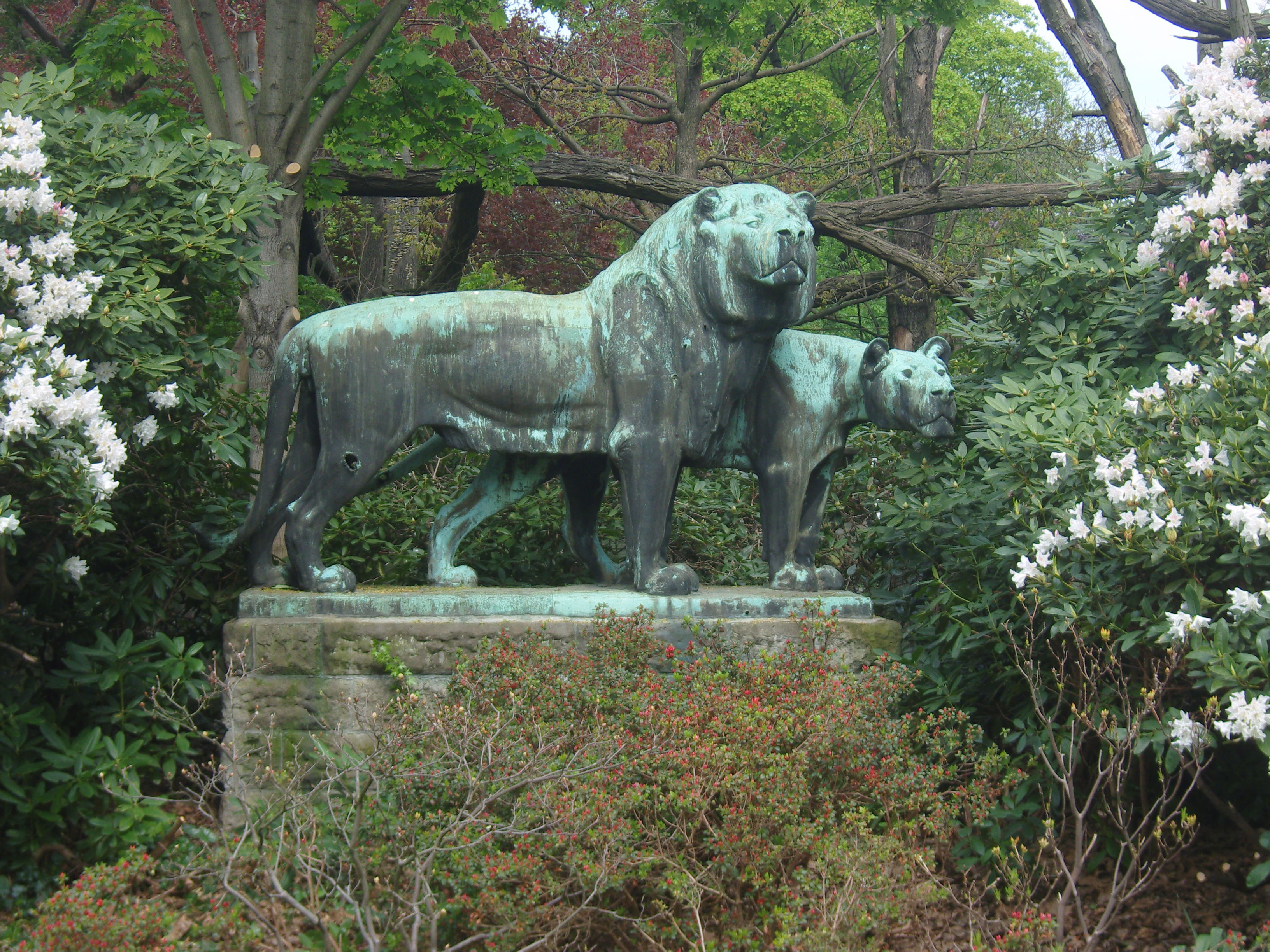 Löwengruppe im Dredner Zoo, geschaffen von Otto Pilz